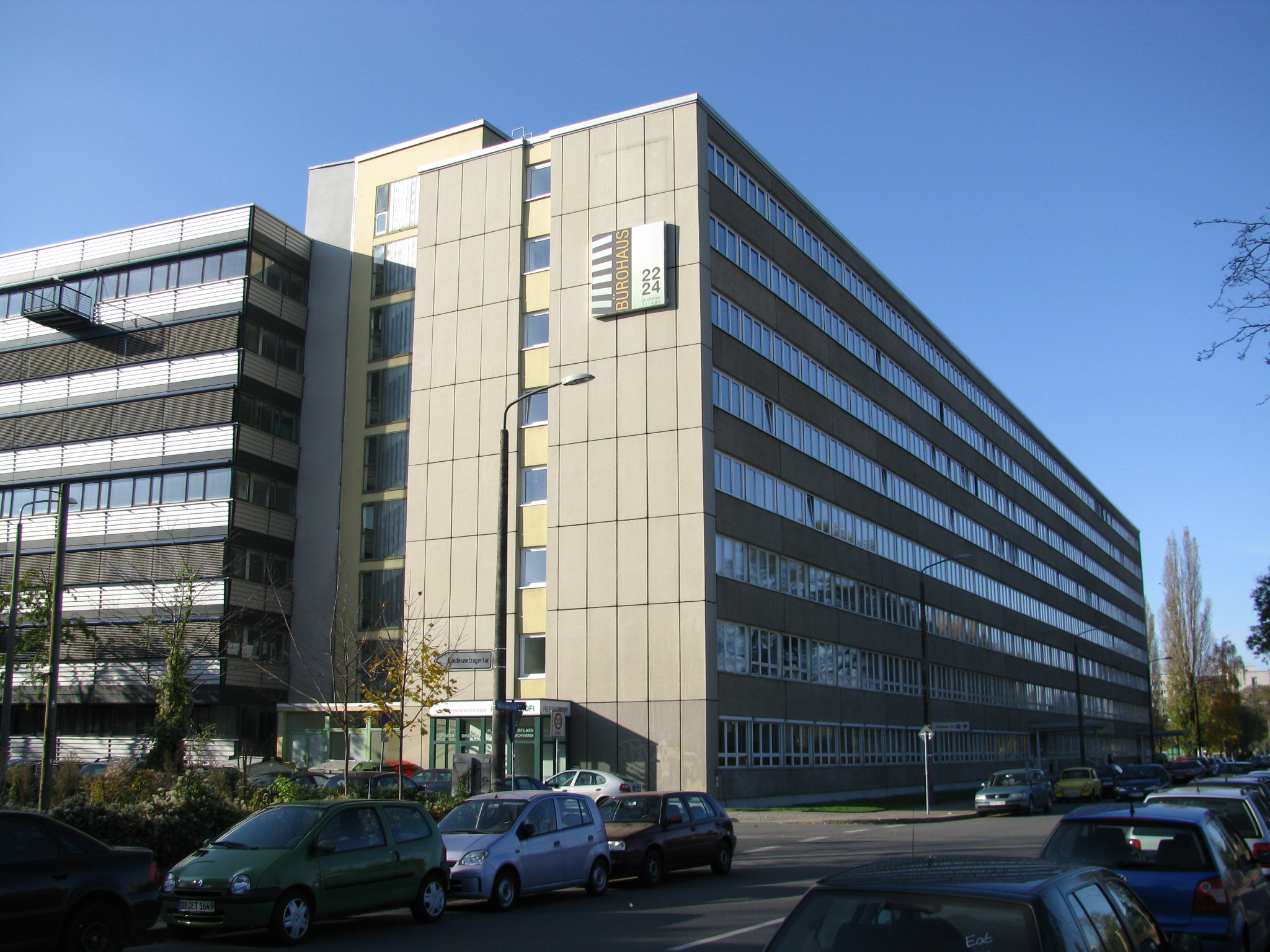 Bürohaus Strehlener Straße 22–24 in Dresden-Südvorstadt